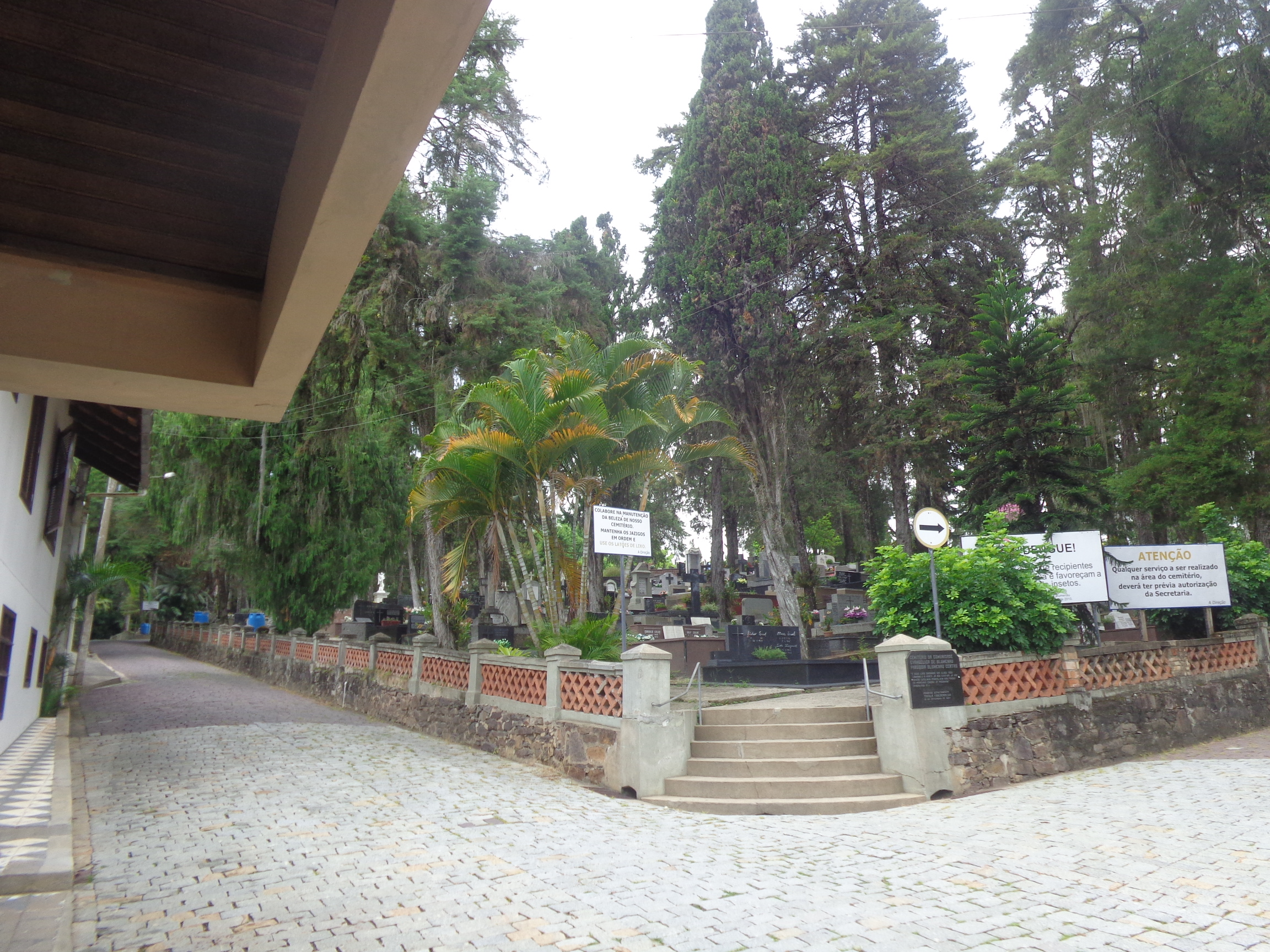 Vista da Entrada Cemitério Luterano Blumenau Centro